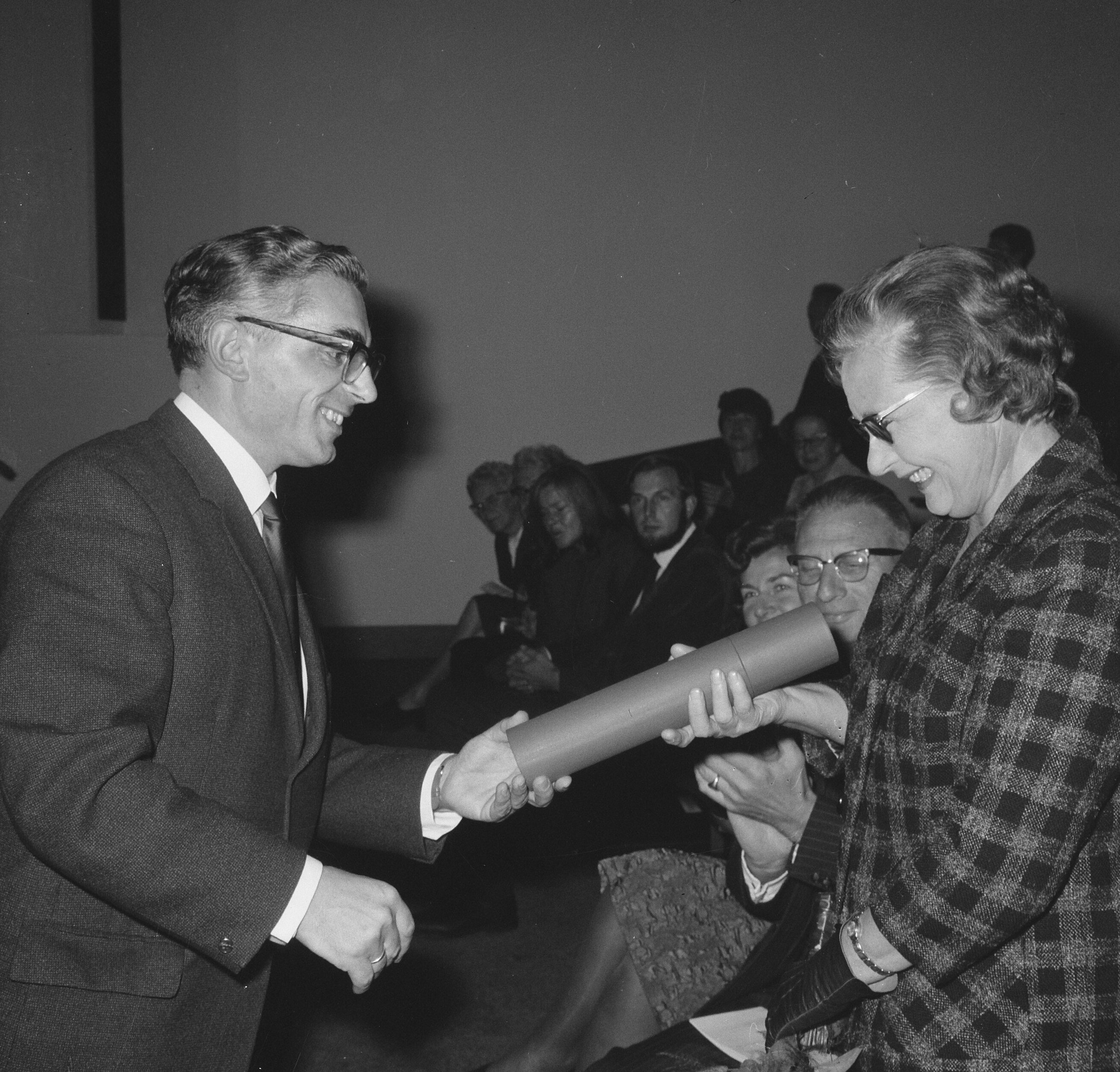 Collectie / Archief : Fotocollectie Anefo Reportage / Serie : Uitreiking aan een aantal kunstenaars van de oorkonde behorende bij de door de Gemeente Amsterdam in 1963 en 1964 toegekende prijzen op het gebied van de kunst in de David Roëllzaal van het Rijksmuseum te Amsterdam Beschrijving : Actrice Mimi Boesnach ontvang prijs Datum : 15 oktober 1965 Locatie : Amsterdam, Noord-Holland Trefwoorden : acteurs, kunst, onderscheidingen, prijzen Persoonsnaam : Boesnach, Mimi Instellingsnaam : Rijksmuseum Fotograaf : Nijs, Jac. de / Anefo Auteursrechthebbende : Nationaal Archief Materiaalsoort : Negatief (zwart/wit) Nummer archiefinventaris : bekijk toegang 2.24.01.03 Bestanddeelnummer : 918-3171